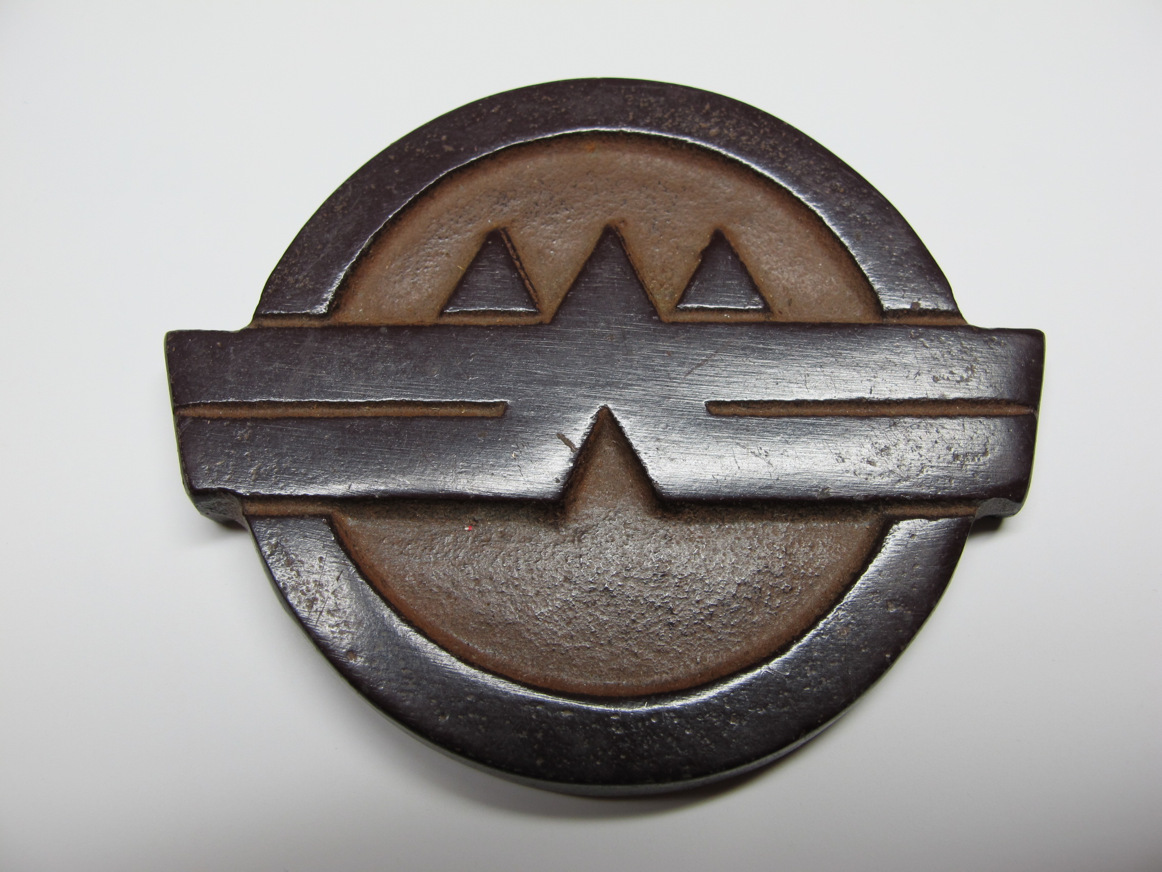 市制施行記念文鎮おもて側